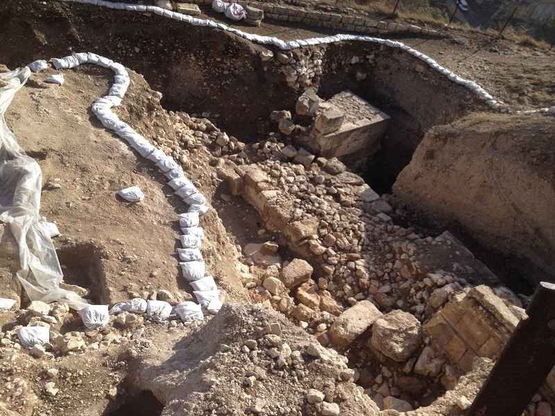 Ausgrabung auf dem Zionsfriedhof, Jerusalem